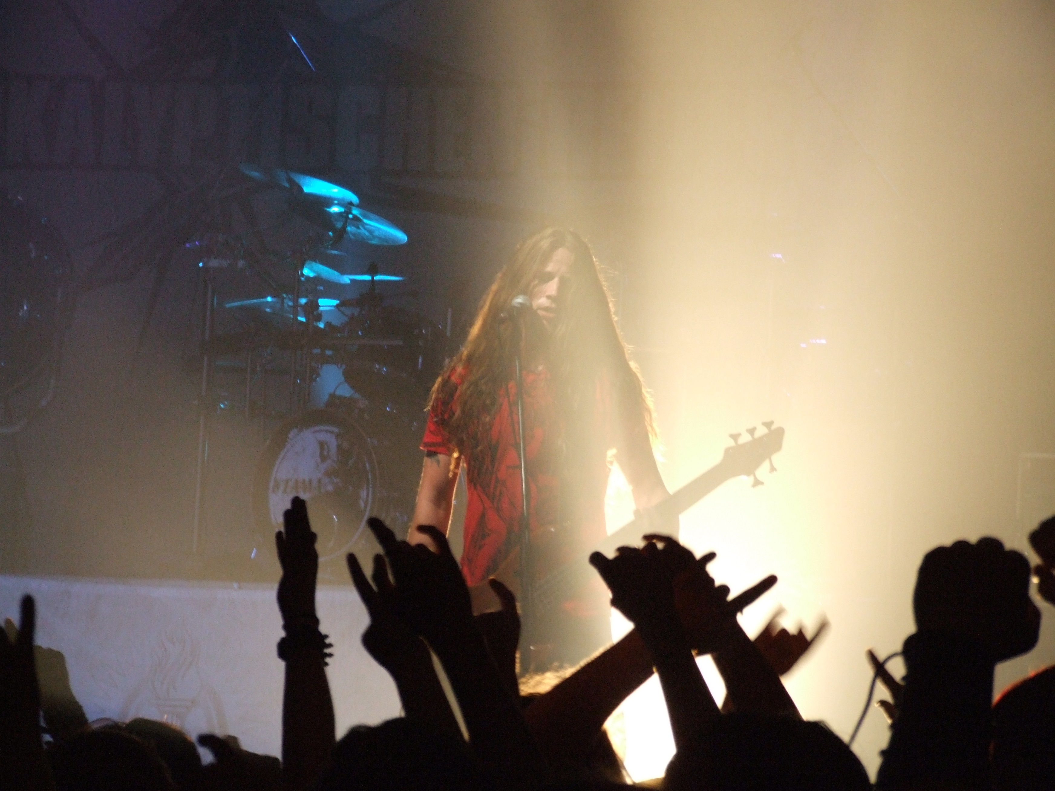 Volk-Man (Volkmar Weber), Bassist, der Thüringer Metal-Band "Die Apokalyptischen Reiter, am 13. Juni 2009, Sommerfesthalle, Otterstadt, Deutschland